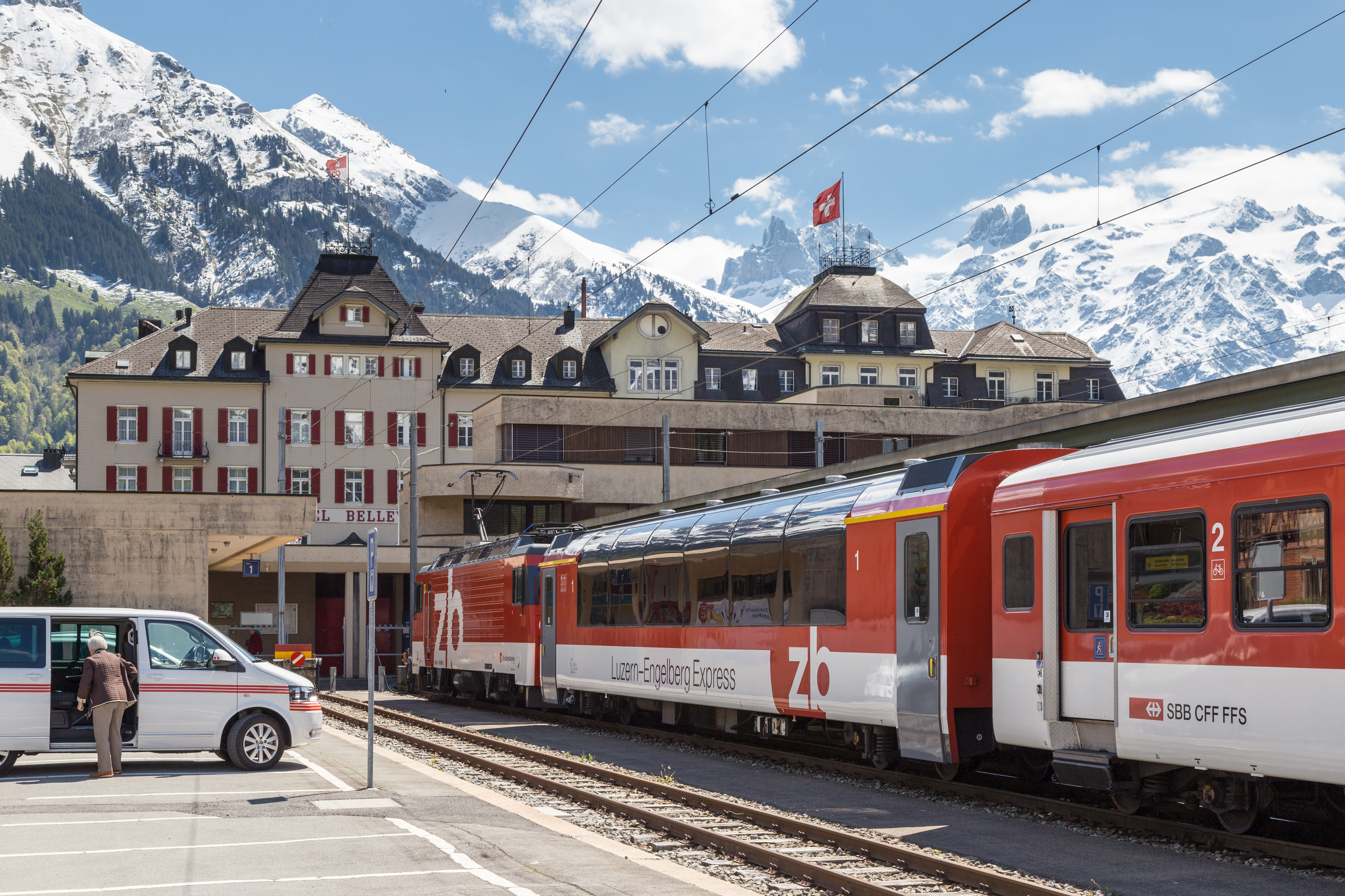 Der Luzern-Engelberg-Express ist in Engelberg angekommen (2014)